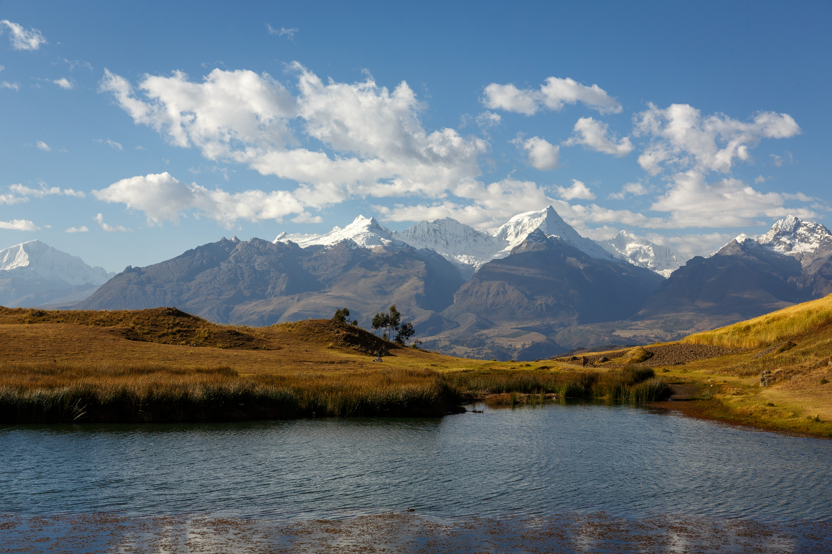 Laguna Wilcacocha, Huaraz - Ancash - Peru.